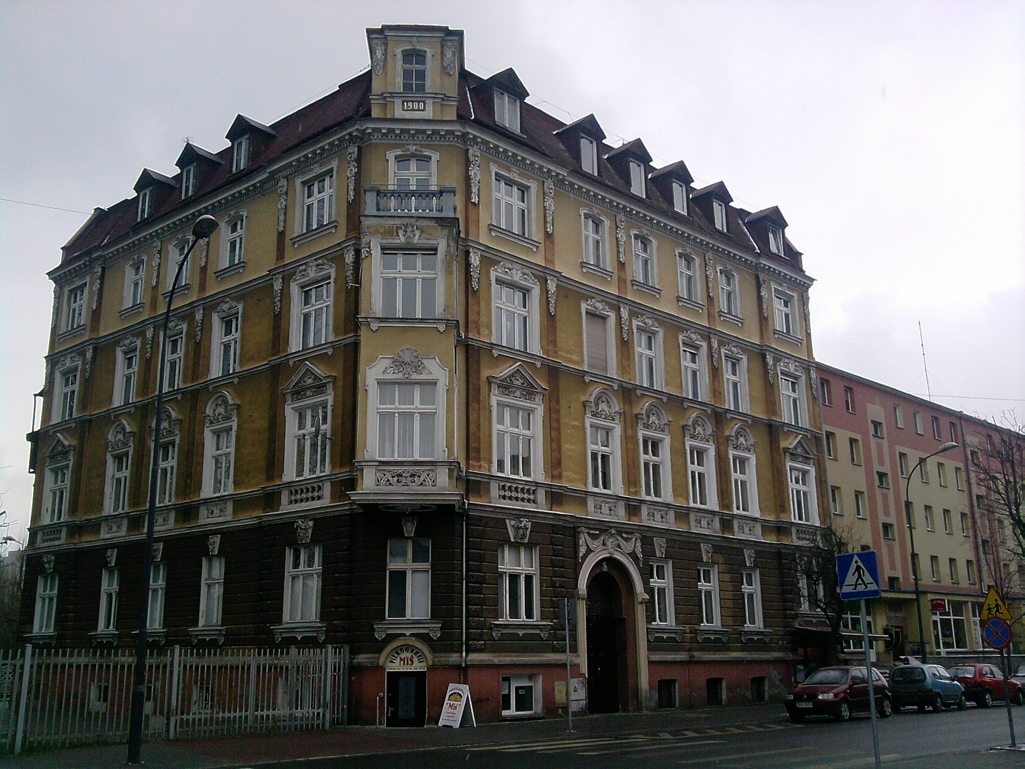 Racibórz, ul. Ogrodowa 32 - kamienica